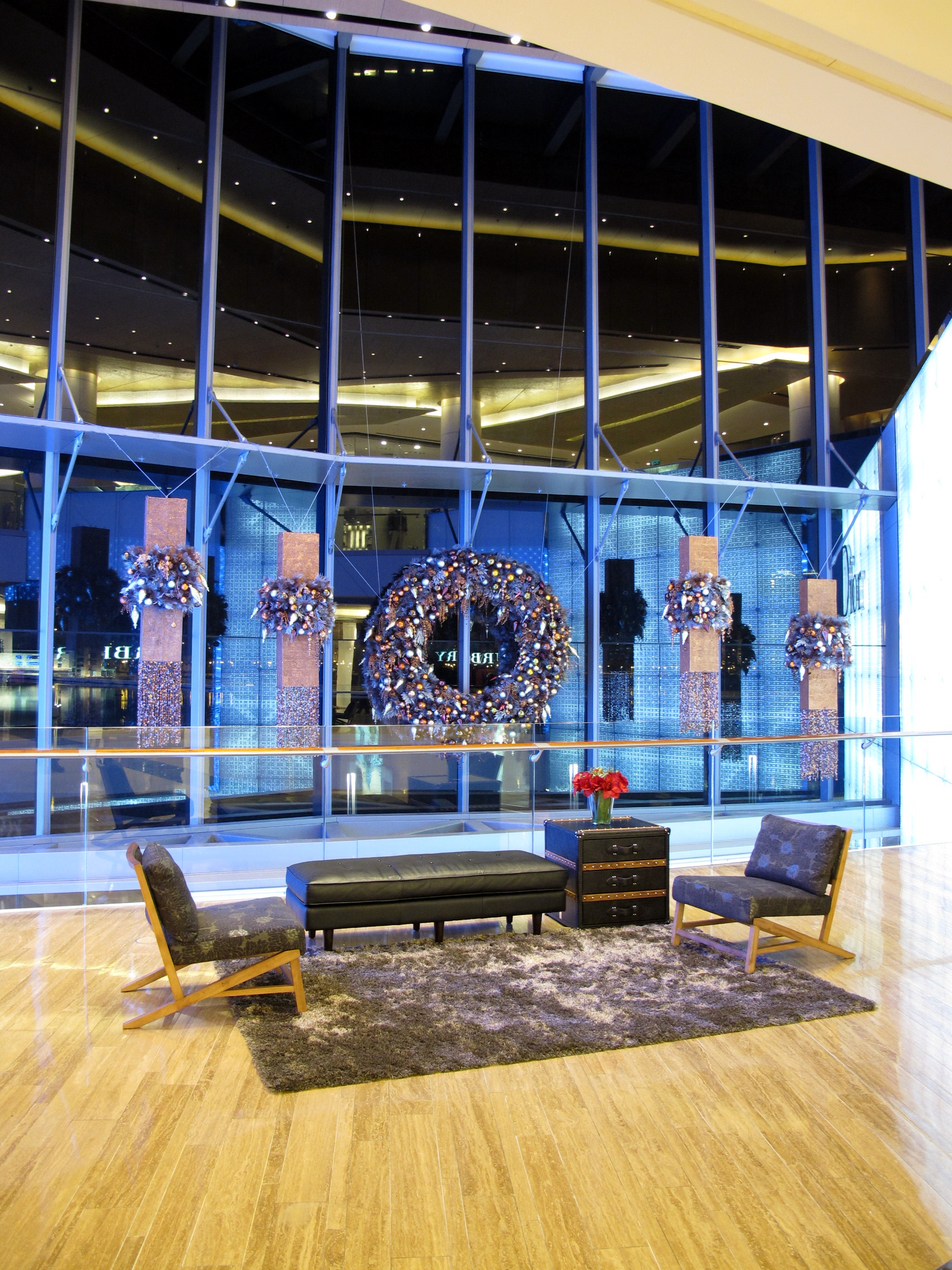 Macau One Central Plaza Level 2 seats area